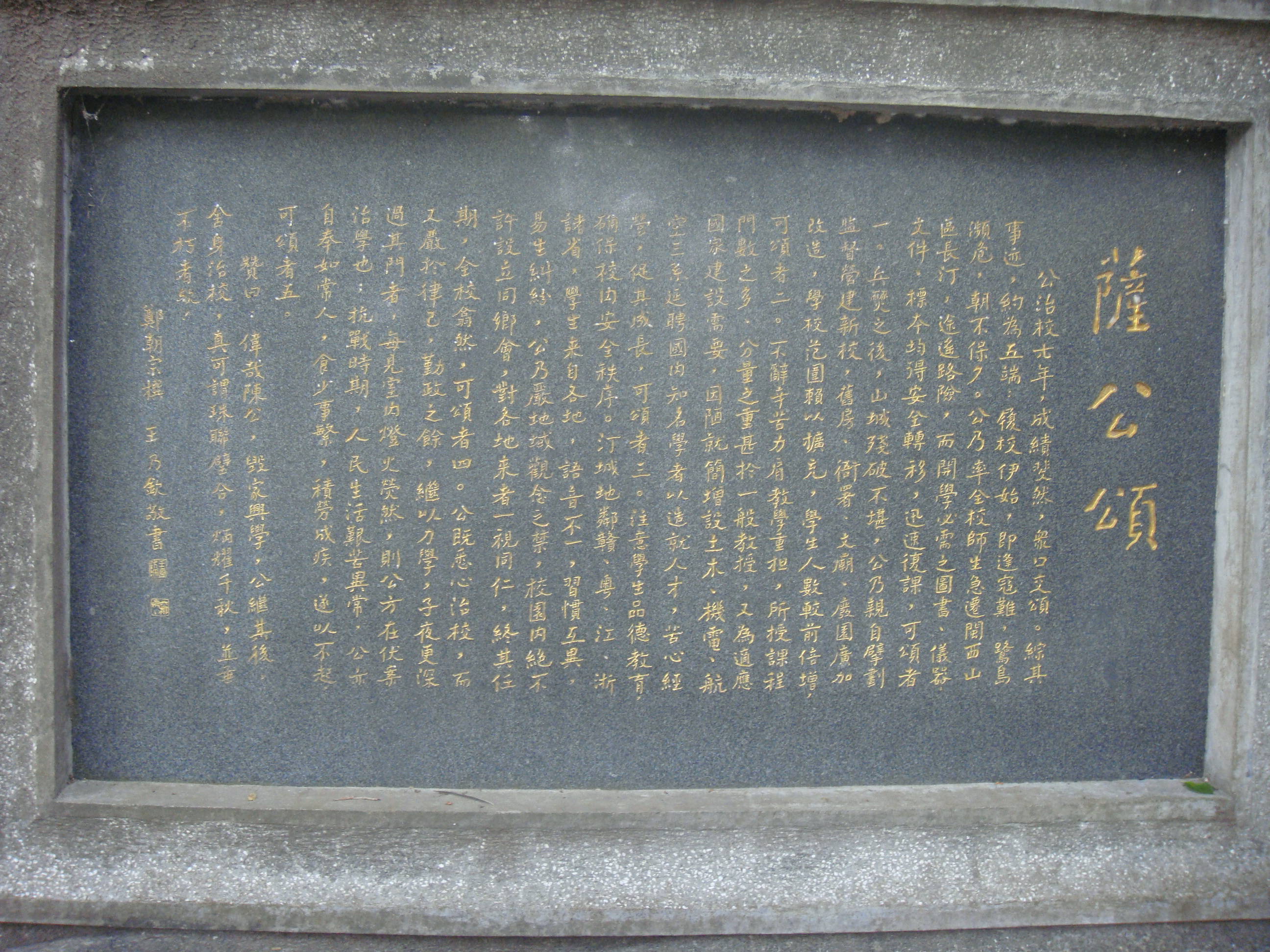 厦门大学内的薩本棟墓碑背面。